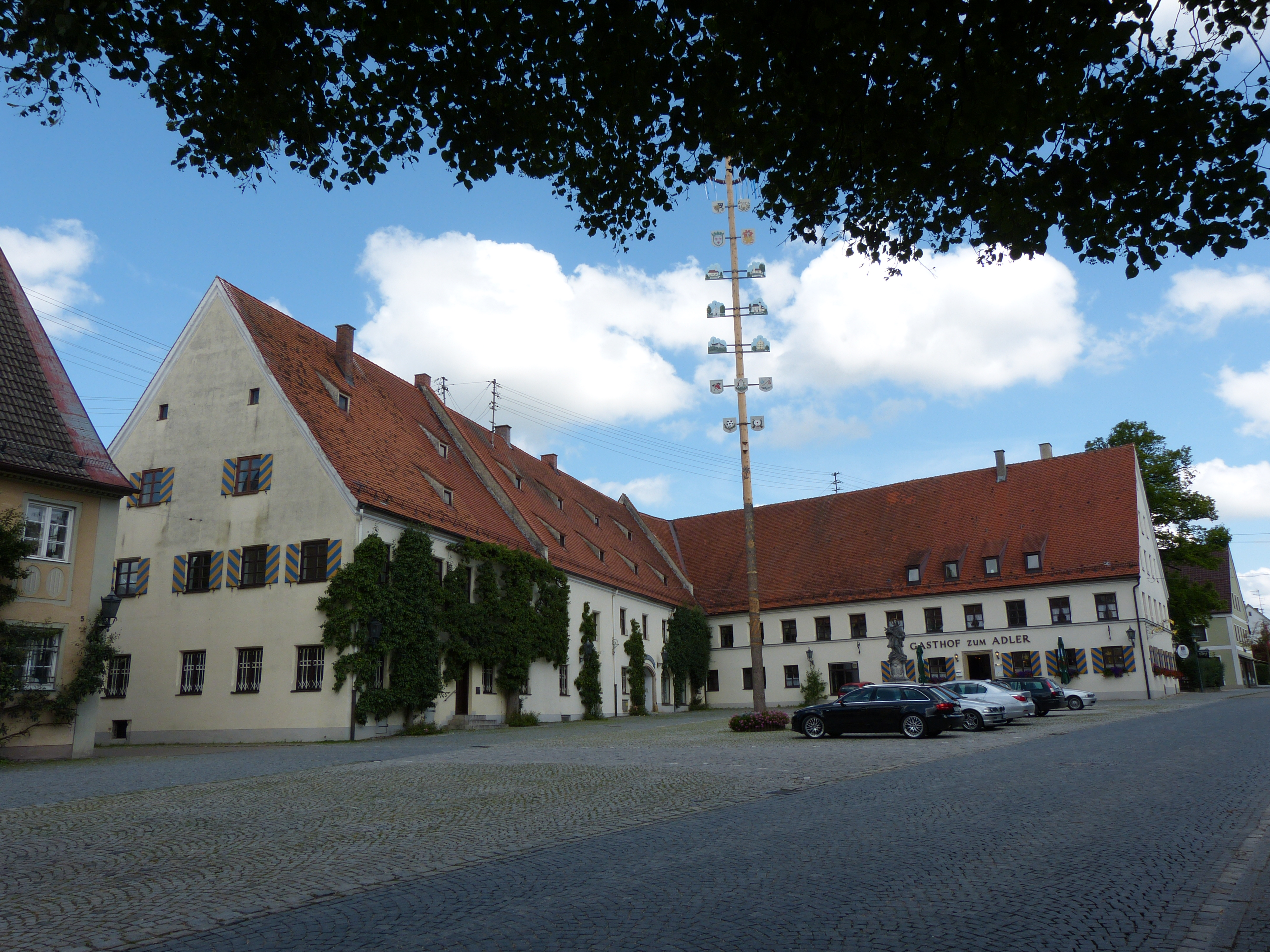 Marktplatz 3, Ehemaliger Gasthof Adler, Kirchheim in Schwaben, Landkreis Unterallgäu, Bayern